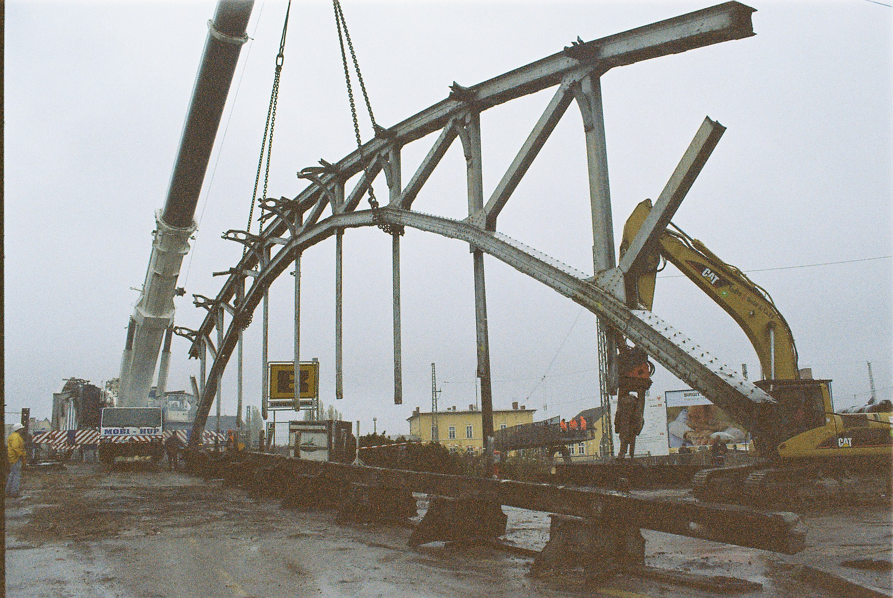 Demontage der Bahnhofsbrücke Eberswalde in Eberswalde, Brandenburg, Deutschland. (Oktober 2004)